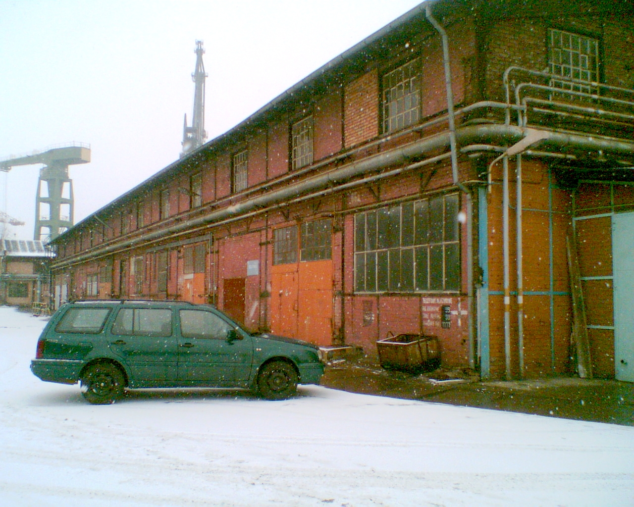 Stocznia Gdańska. Warsztat naprawy wózków akumulatorowych, w którym w latach 80. pracował Lech Wałęsa